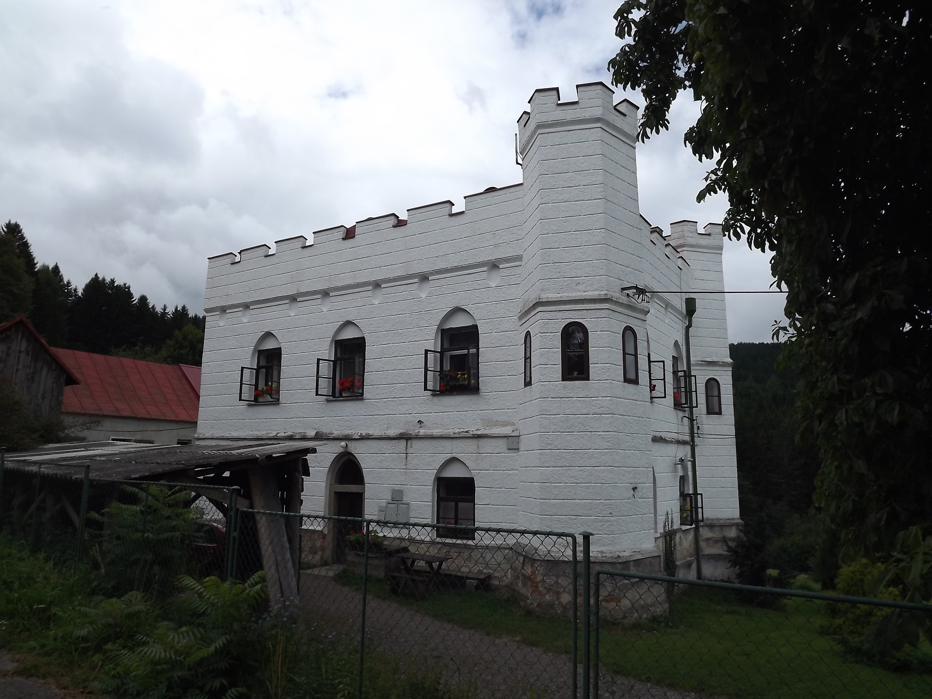 Pohorsko